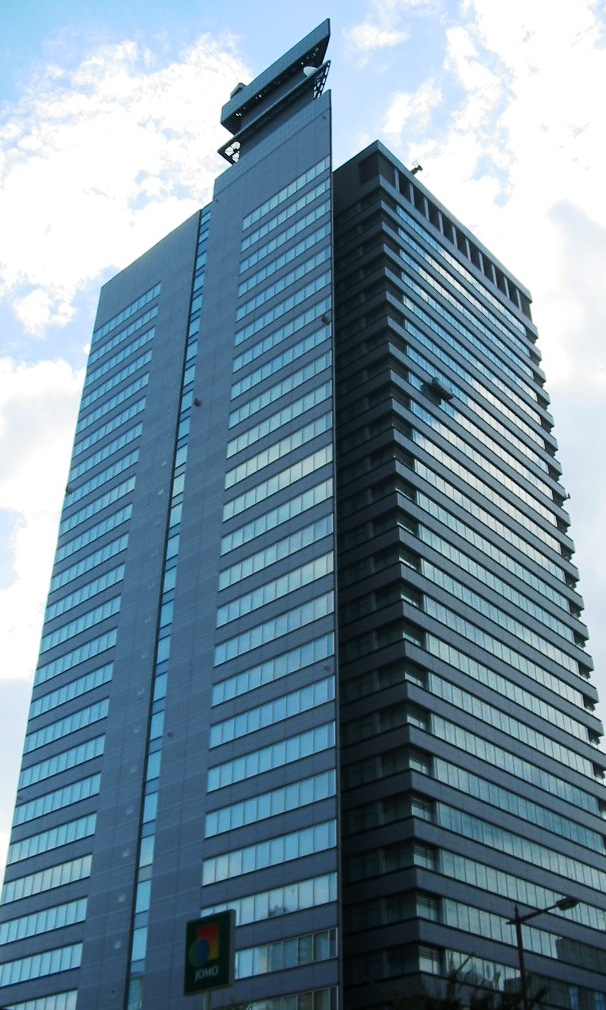 *撮影日 - ja:2007年ja:9月8日 *撮影者 - FM827 ==ライセンス== 2007年9月8日撮影。国道45号線ja:花京院交差点より撮影。 Category:仙台市の画像